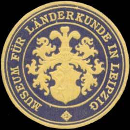 Sealing stamp Title: Museum für Länderkunde in Leipzig Description: dunkelblau, gelb, geprägt Place: Leipzig size: 4 cm